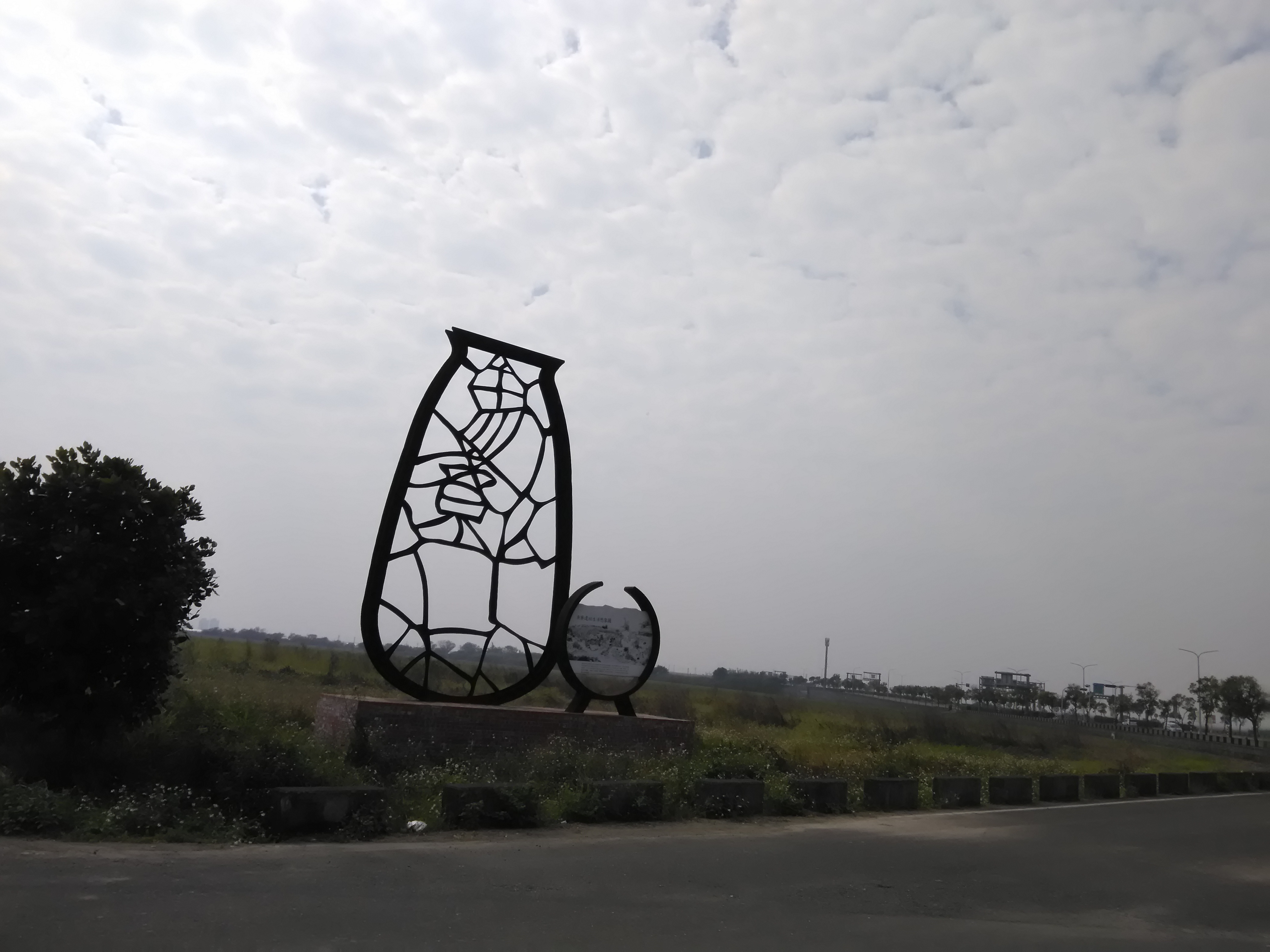 中文（台灣）: 魚寮遺址地標